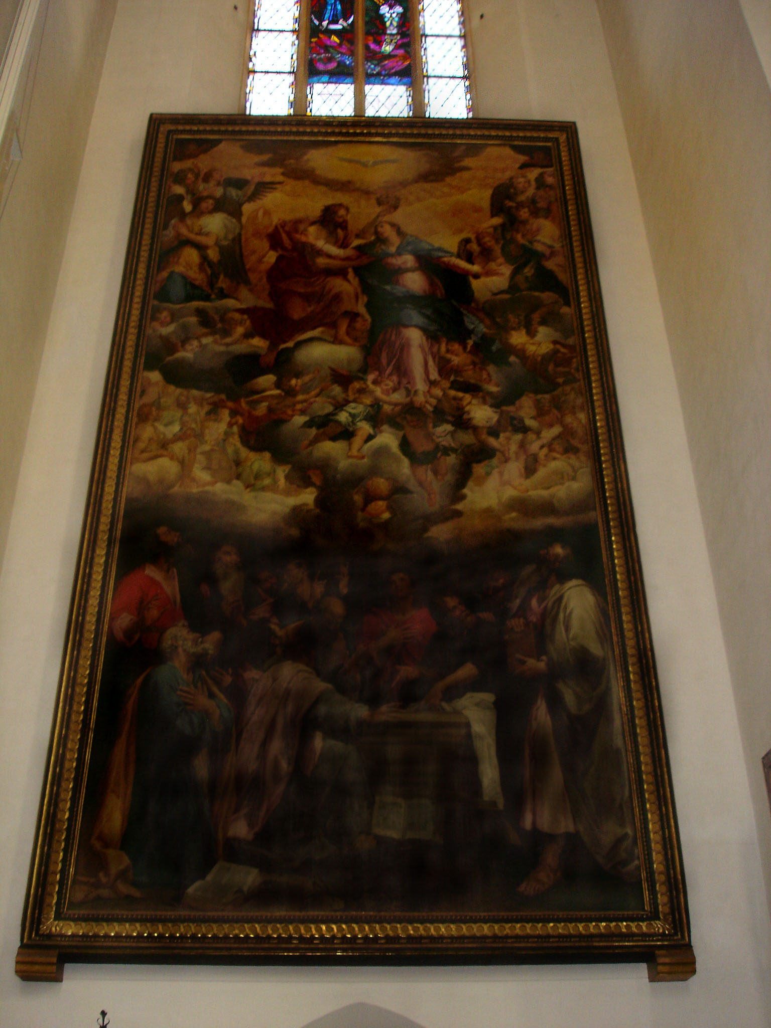 ehem Hochaltarbild der Münchner Frauenkirche